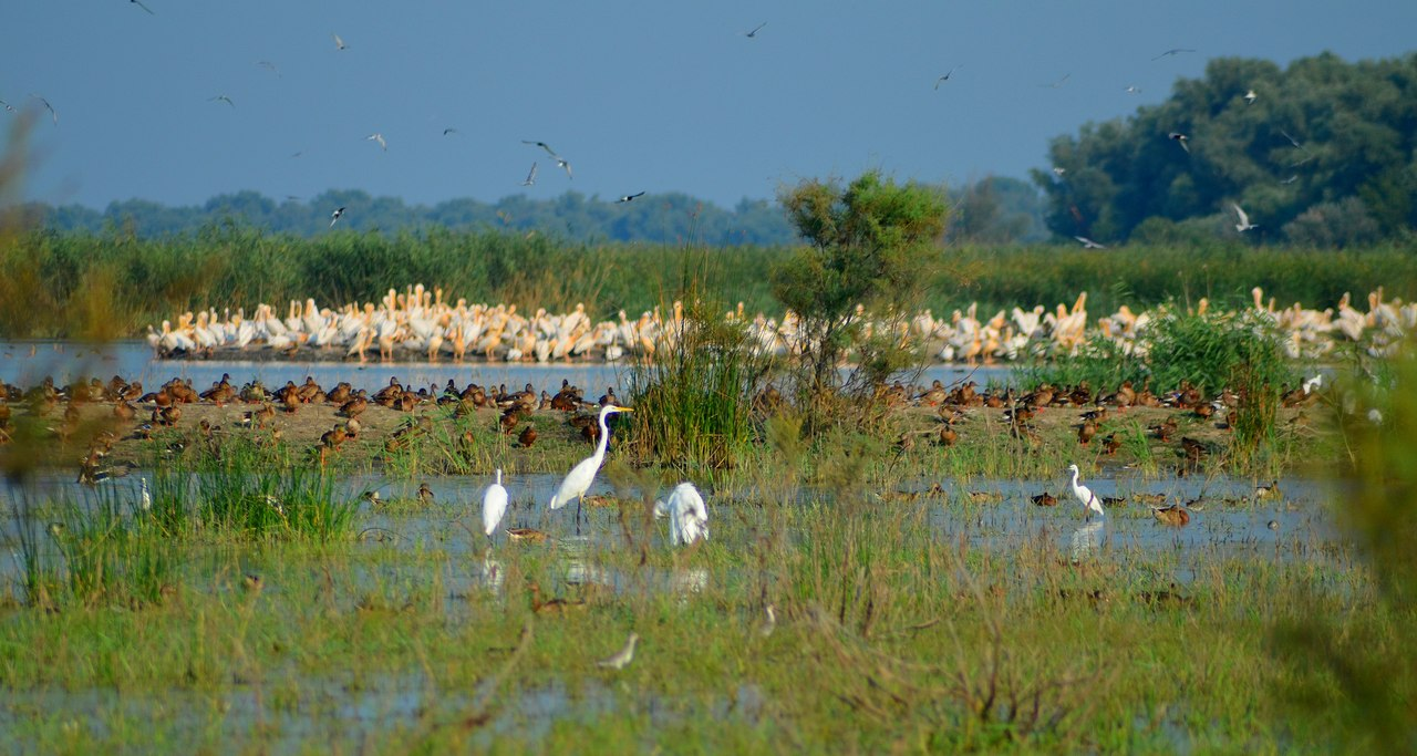 Дунайський біосферний заповідник, Кілійський р-н, м. Вилкове, вул. Татарбунарського повстання, 132 а